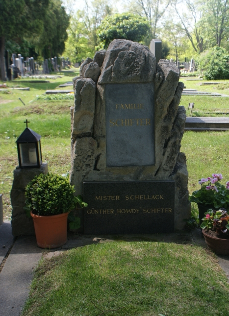 Wiener Zentralfriedhof-Günther Schifter